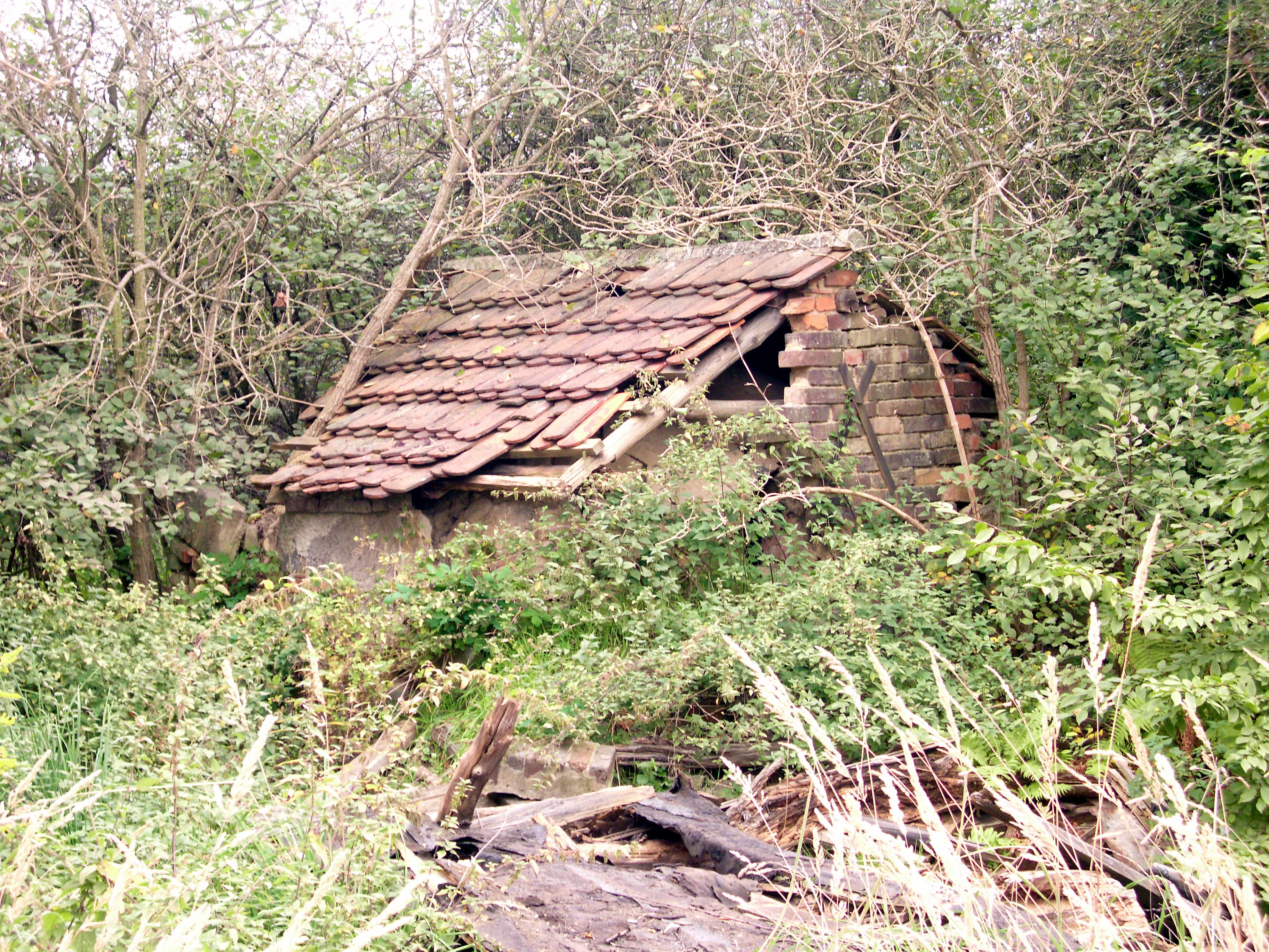 Original erhaltener Backofen in Schernsdorf, Siehdichum, Brandenburg